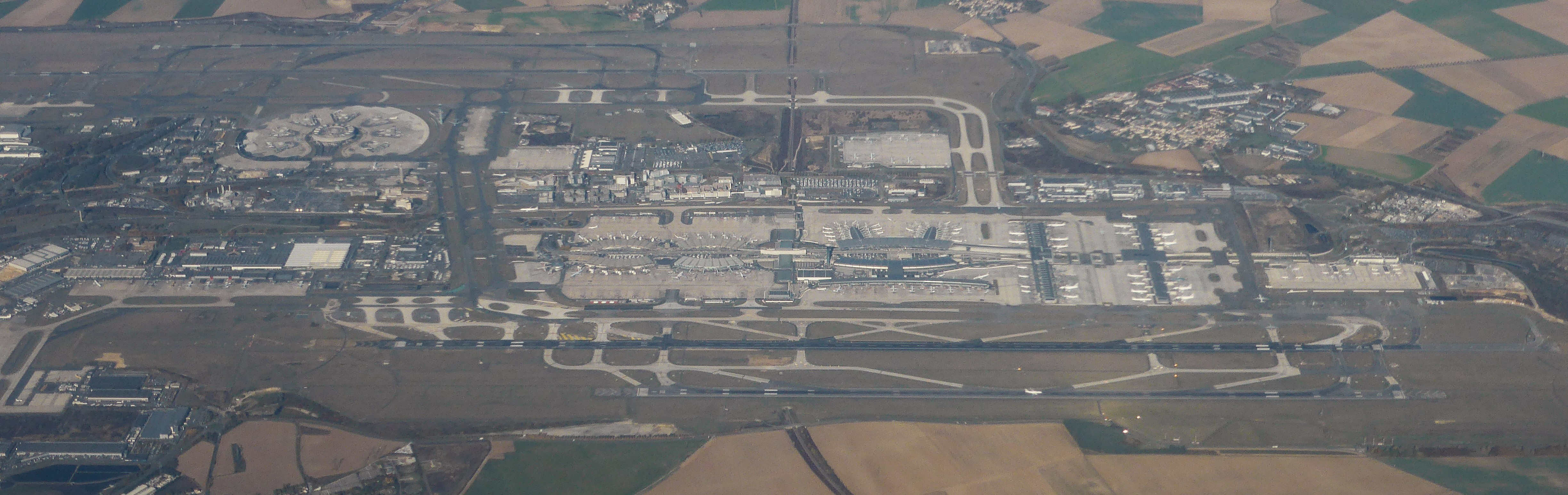 Vue aérienne de l'aéroport Paris Charles de Gaule à Roissy